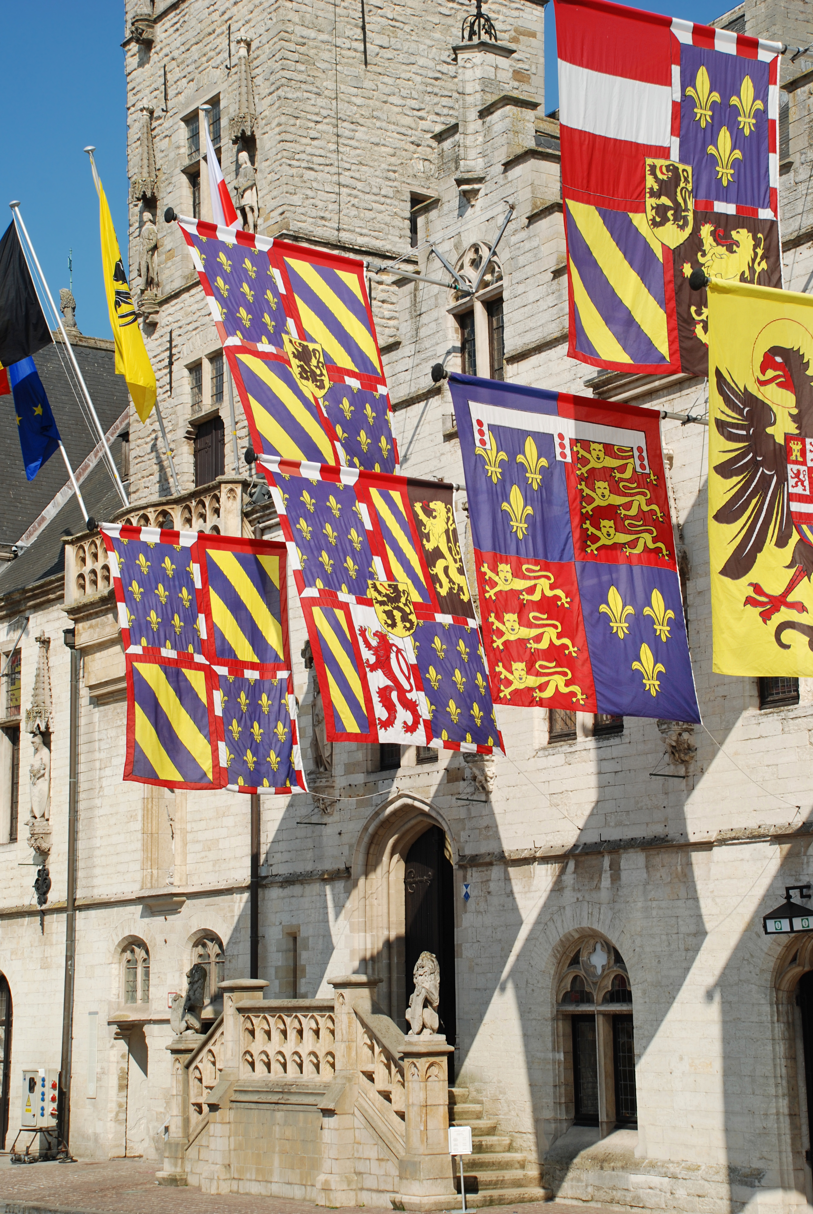 Belgique - Termonde (Dendermonde) - Halle aux draps et Hôtel de ville (Lakenhal en stadhuis) : drapeaux